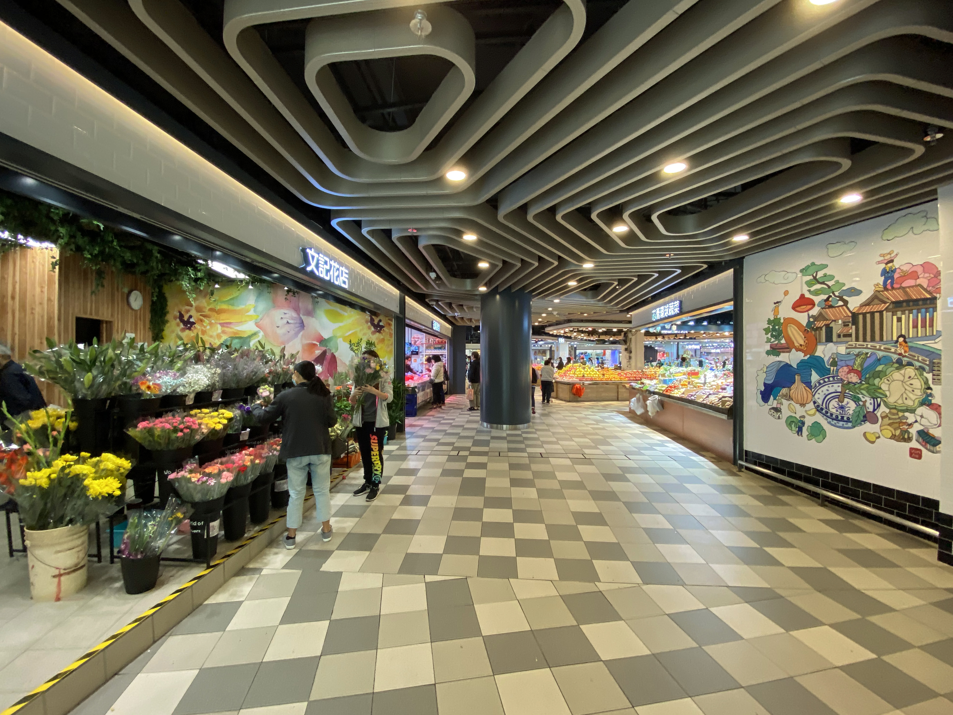 Hing Keng Market after renovation